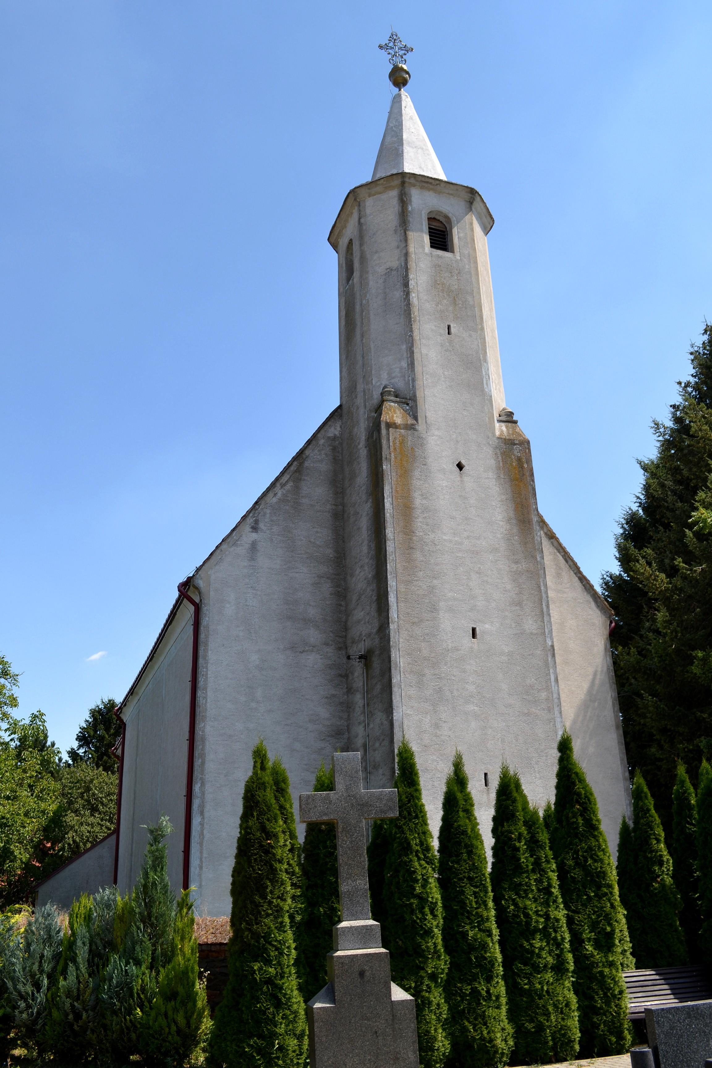 Borová (okr. Trnava), Kostol svätého Štefana; veža kostola